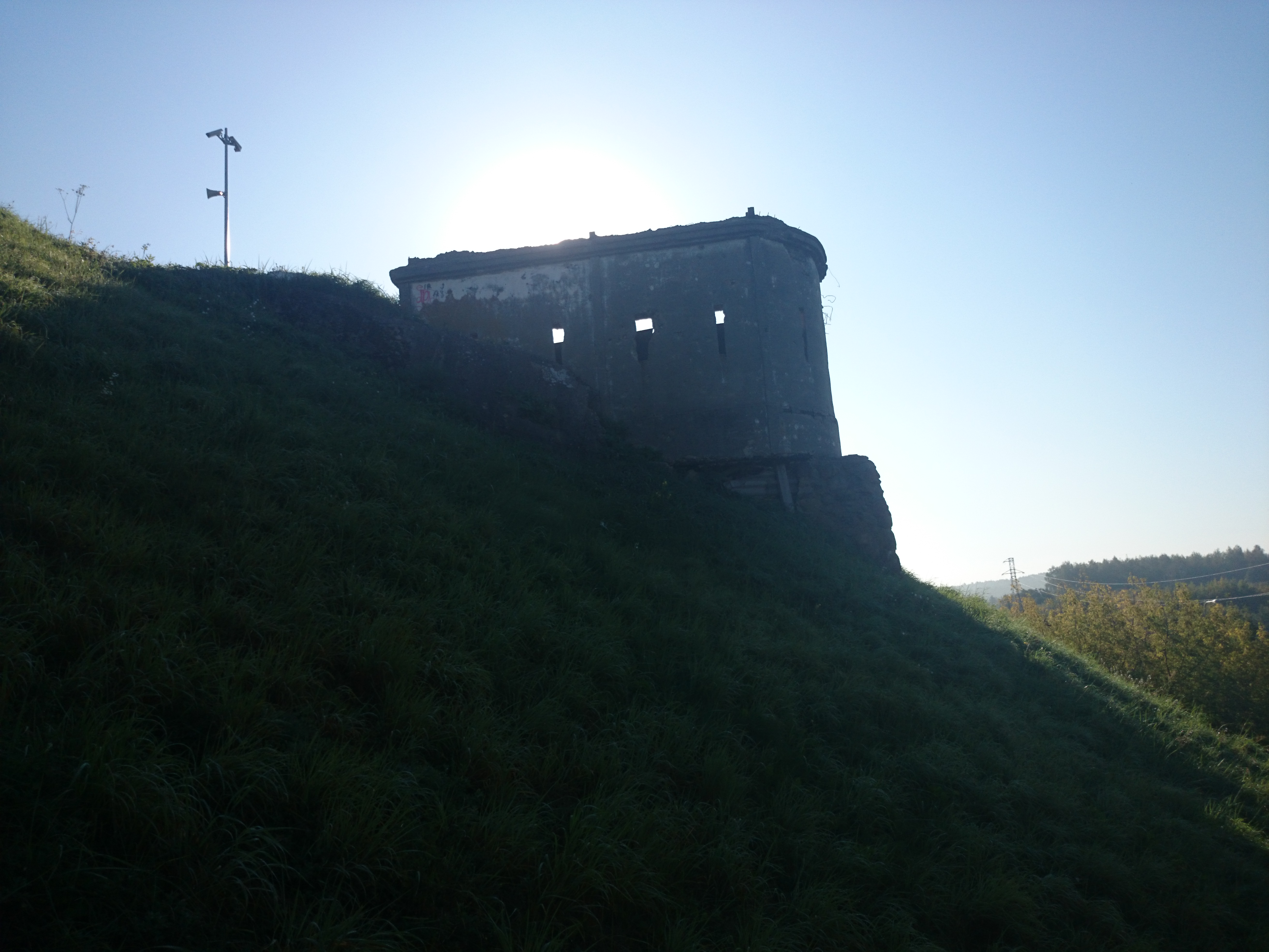 Jonava railway bunker